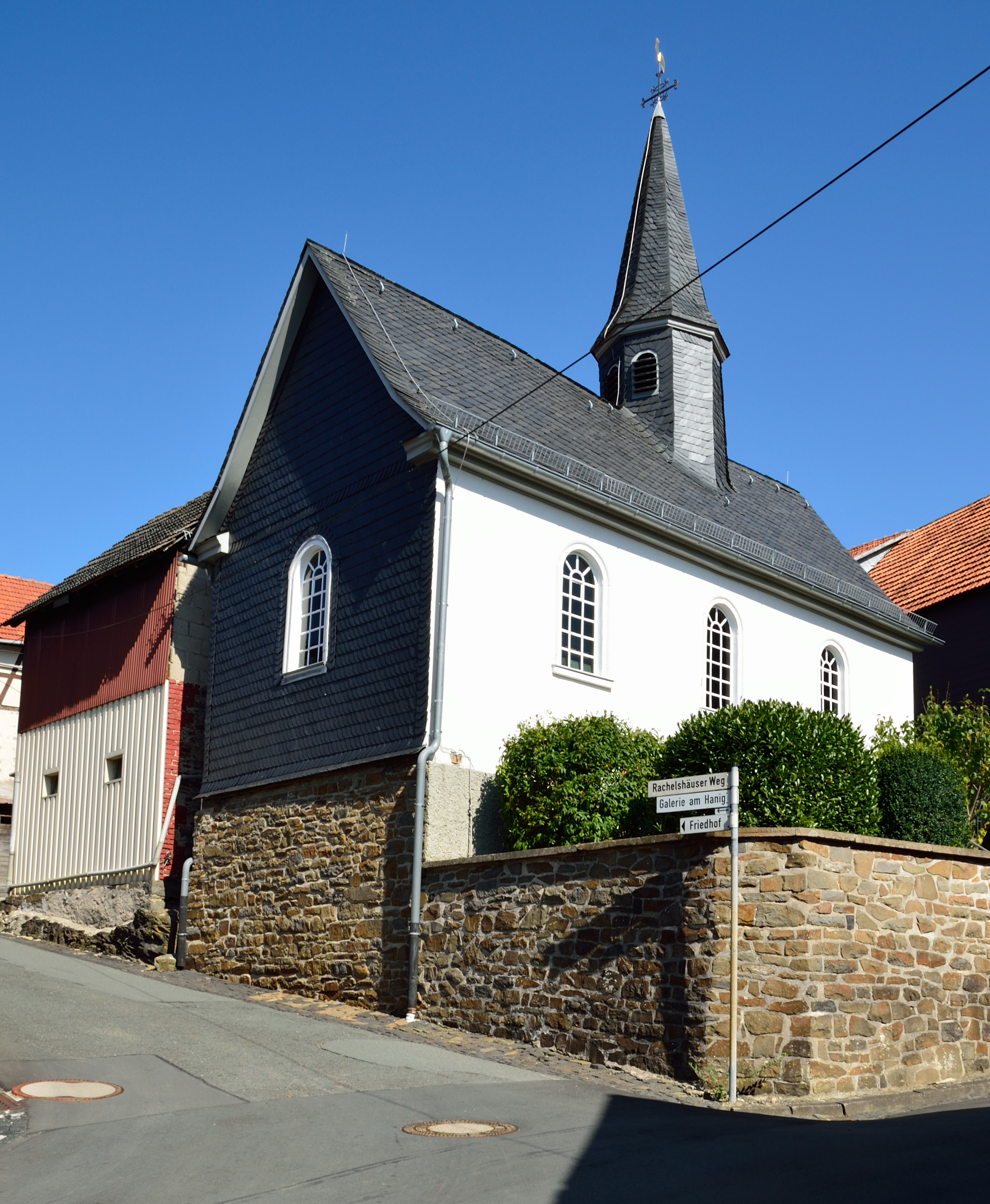 Die Kirche oder Kapelle in Römershausen (Gladenbach)